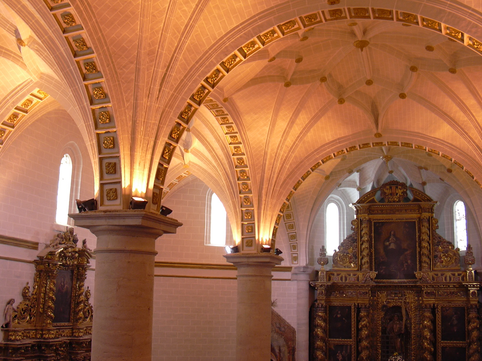 Aragonés: Interior d'a Ilesia de Sant Lorient en Magallón (Campo de Borcha, Aragón).